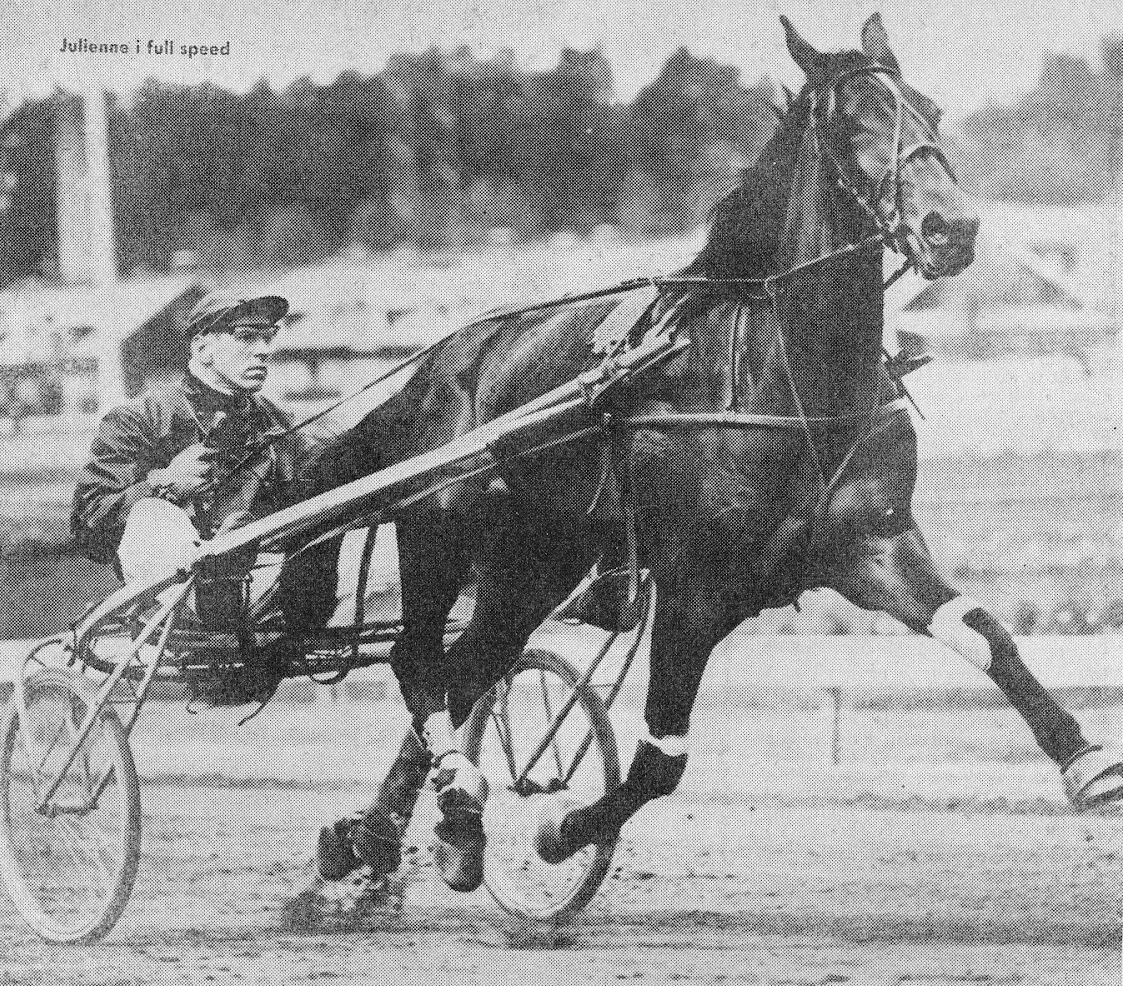 Sören Nordin och Julienne från reportage i Tidningen Rekord 18/1962.